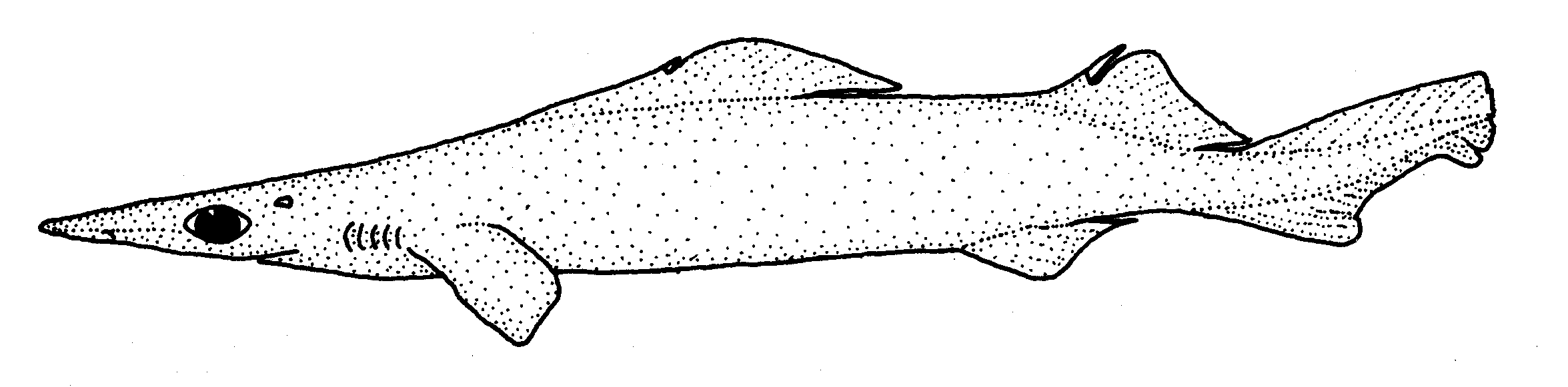 Deania calcea (Birdbeak dogfish)